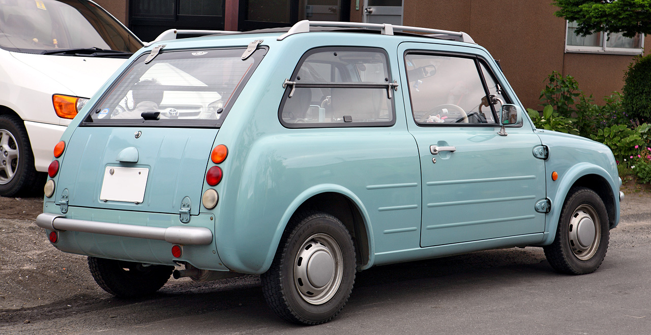 Nissan Pao Canvas Top ( PK10 )